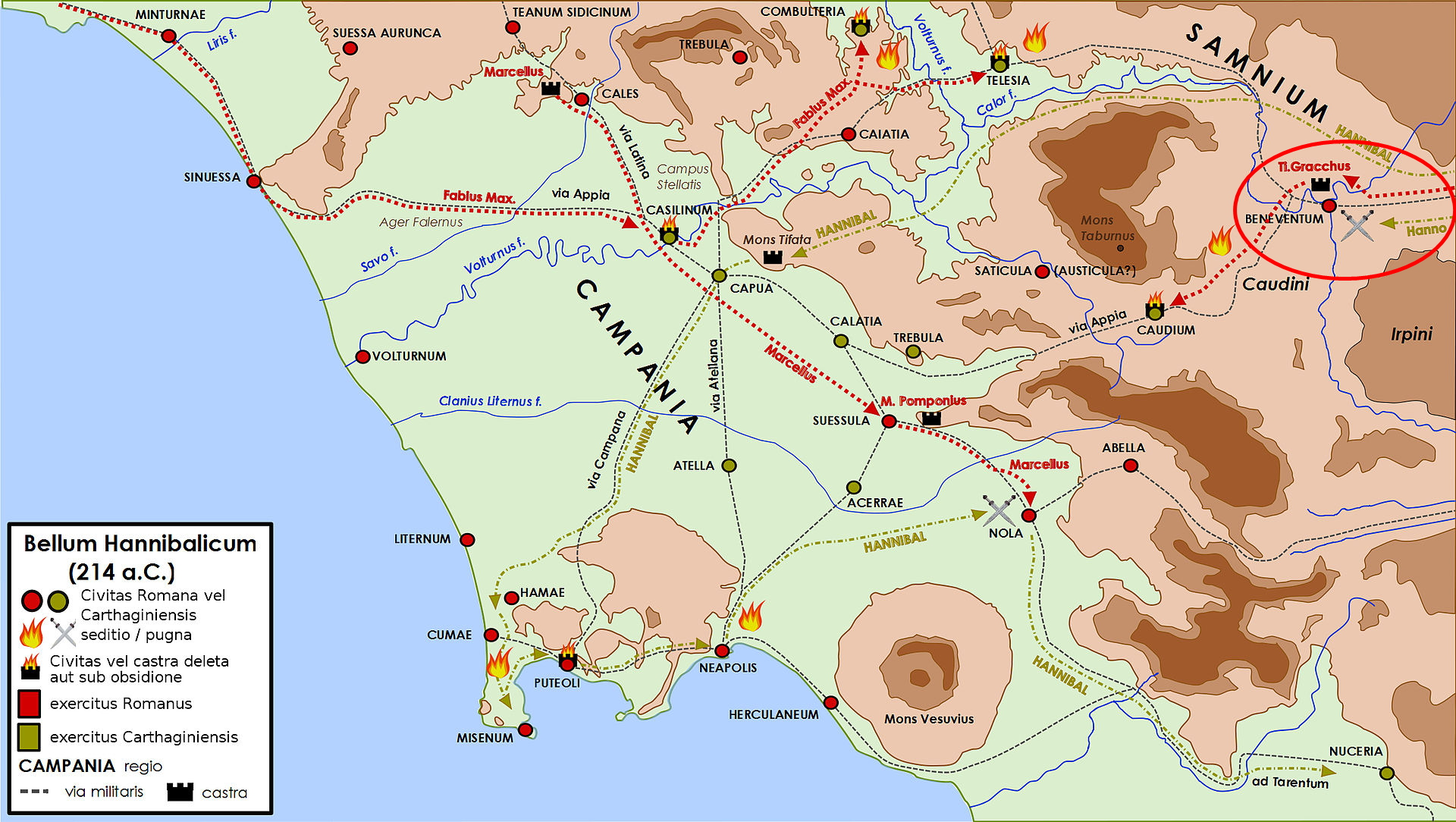 Die Erste Schlacht von Beneventum an der etwa 8.000 Sklaven, in der Überlieferung als die legiones volonum benannt, auf römischer Seite zum Einsatz kamen.